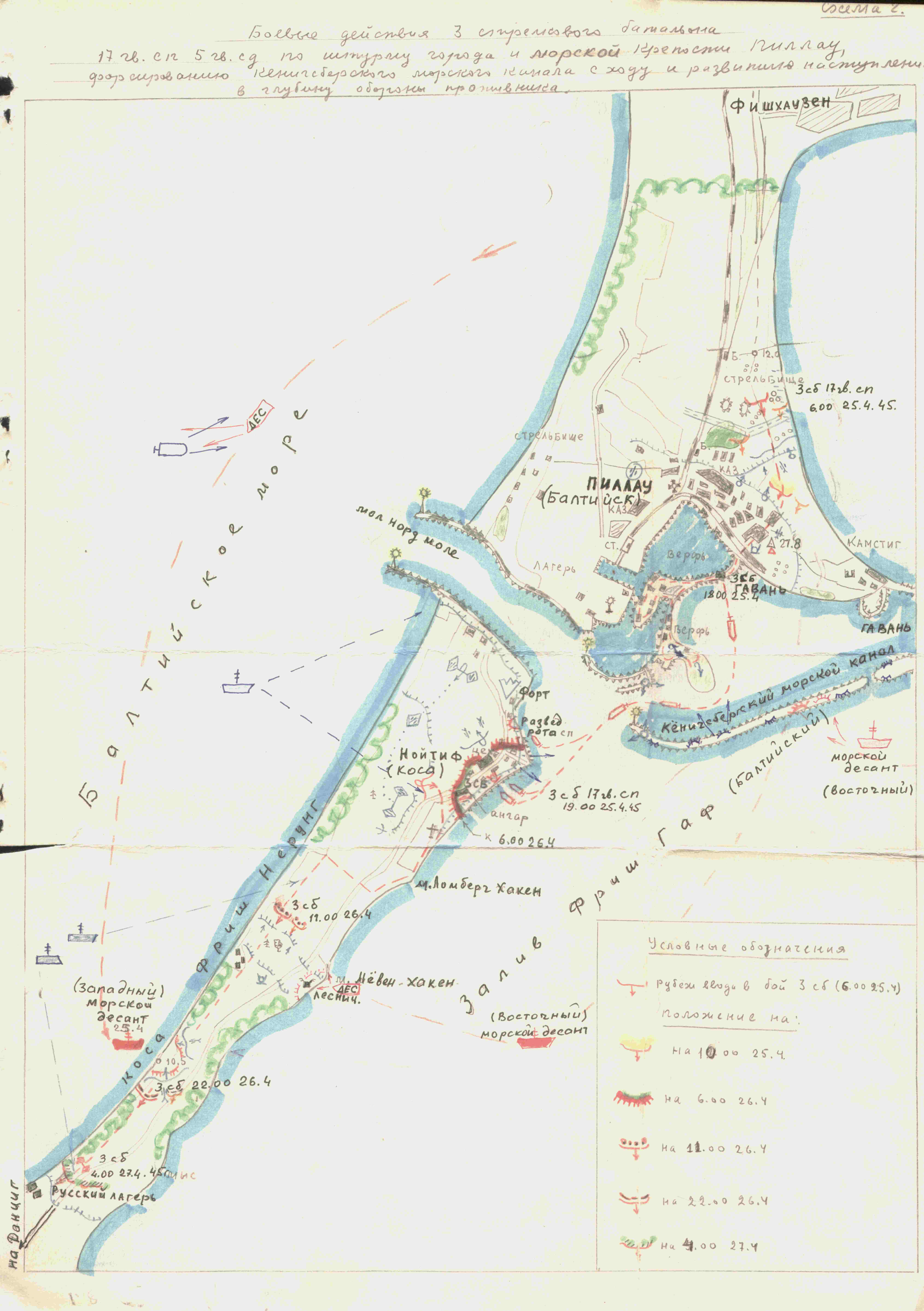 Боевые действия 3-го сб, 17 гв. сп, 5 гв. сд (комбат А. Дорофеев) в штурме Пиллау (Балтийск), форсировании залива Фриш Гаф и захвате плацдарма на косе Фриш Нерунг (Балтийская) 25-27 апреля 1945 г. (схема)